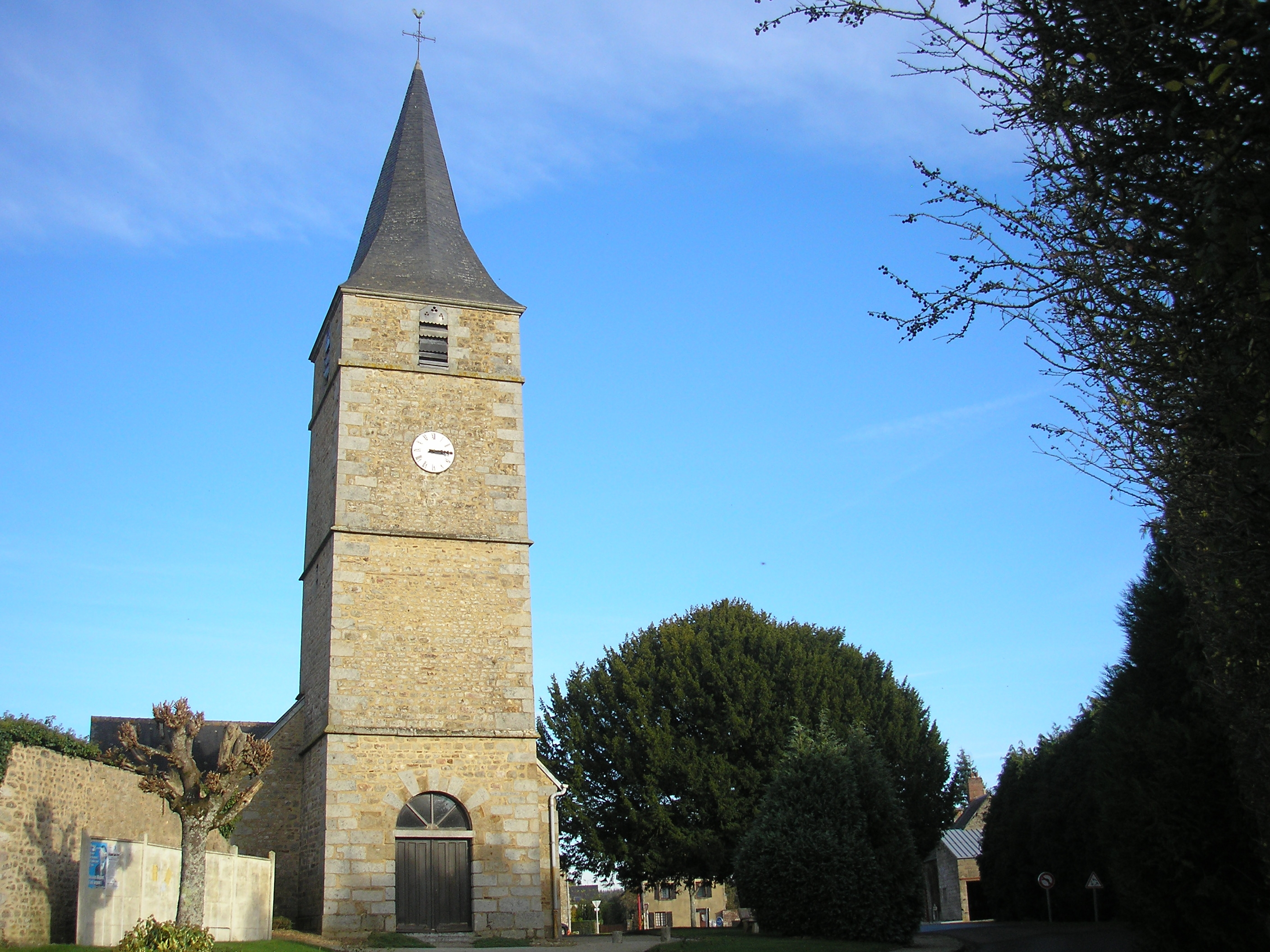 Saint-Sauveur-de-Carrouges (Normandie, France). L'église Saint-Sauveur.